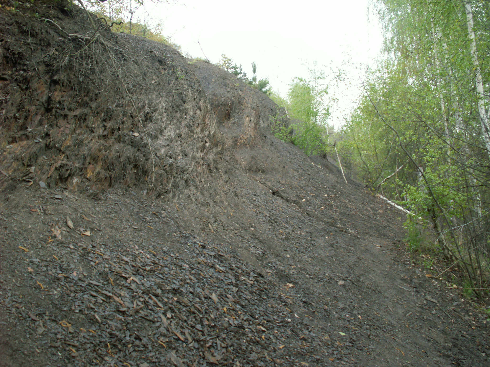 Góry Pieprzowe w Sandomierzu